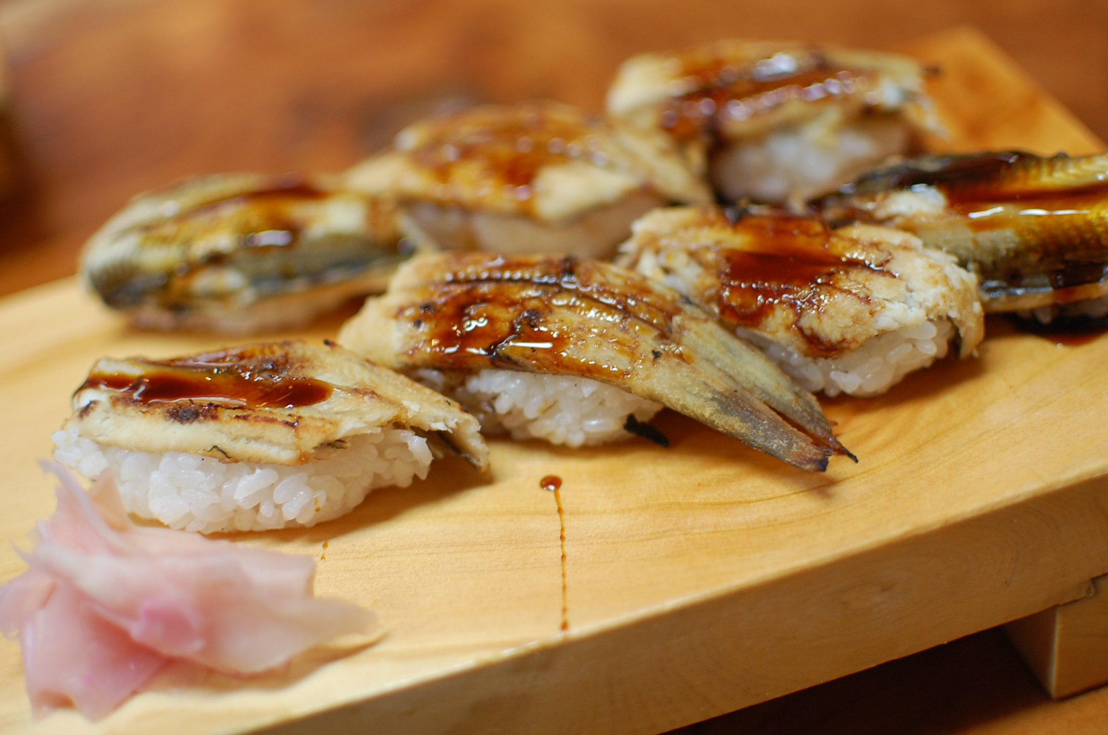 アナゴの寿司